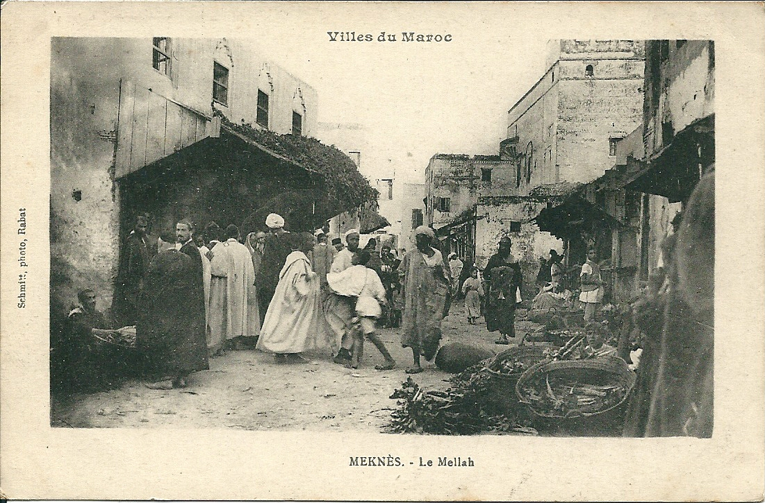 Le Mellah à Meknès (Maroc) vers 1919